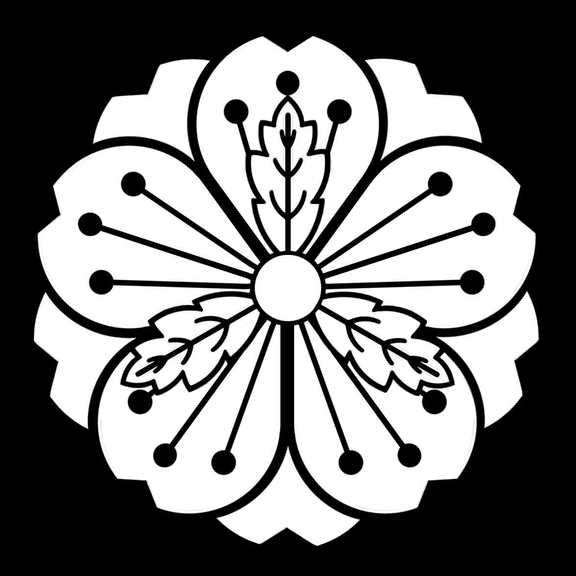 「塩竈桜」紋（染抜）